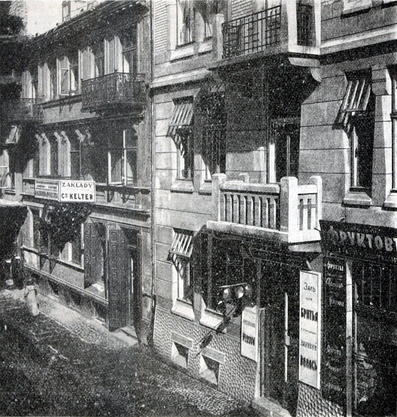 Drukarnia Chaima Keltera, w której wydrukowano pierwszy podręcznik języka esperanto L. Zamenhofa. Ul. Nowolipie 11